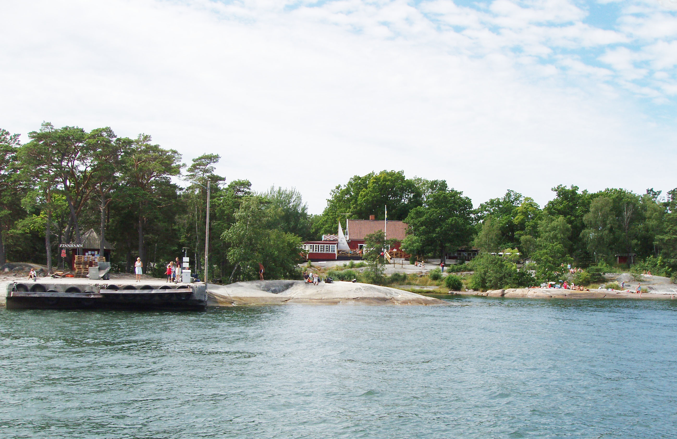 Finnhamns huvudbrygga och strandcafé.